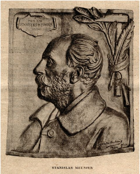 Stanislas Meunier par Lecomte de Noûy 1920